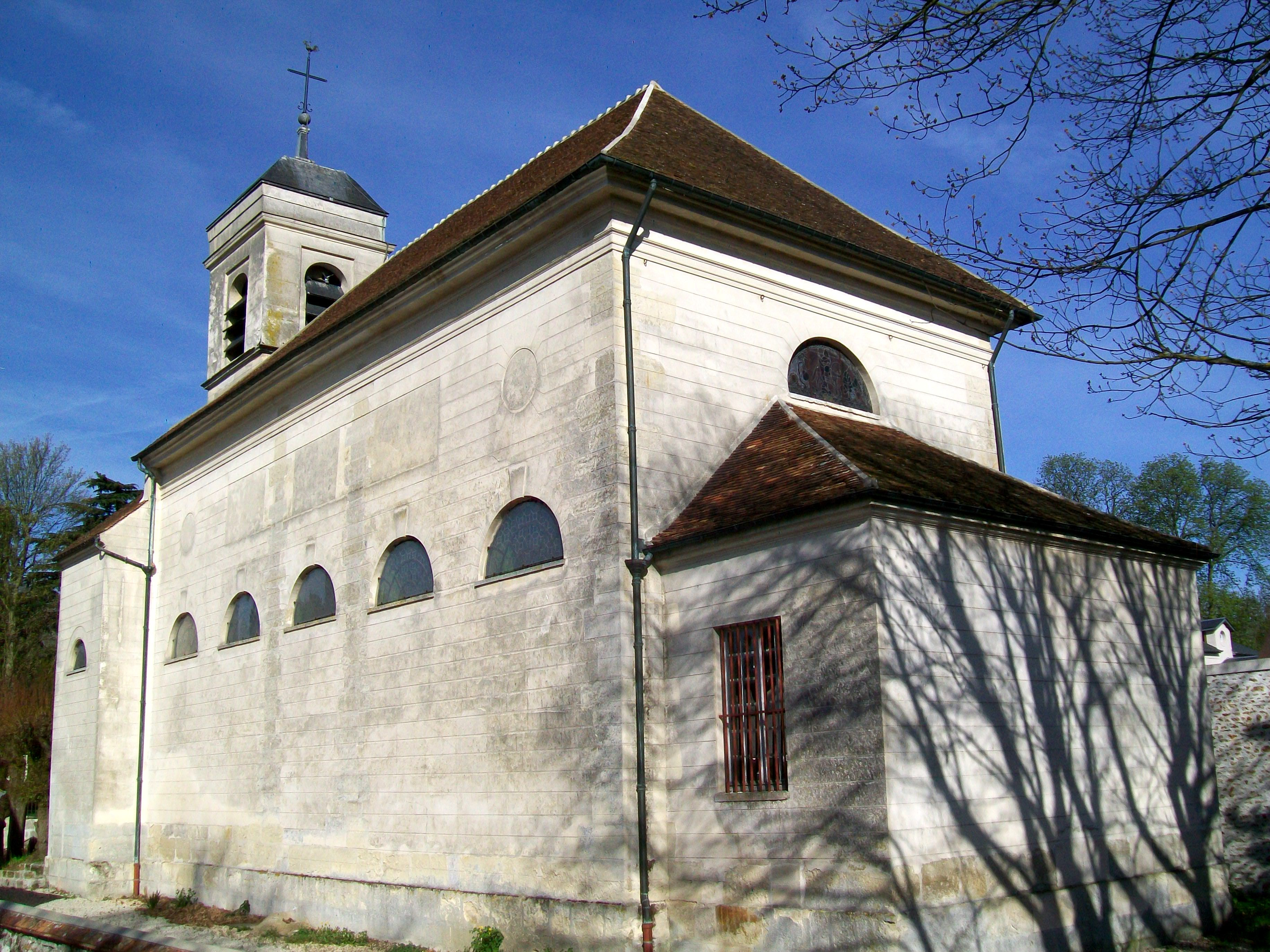 L'église néoclassique Saint-Martin de Châtenay-en-France, classée monument historique depuis le 2 janvier 1990.